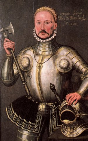 George Schenck van Toutenburg (1480-1540)